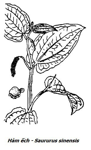 Cây Hàm Ếch - Hình ảnh từ sách: Những cây thuốc và vị thuốc Việt Nam của GS-TS Đỗ Tất Lợi